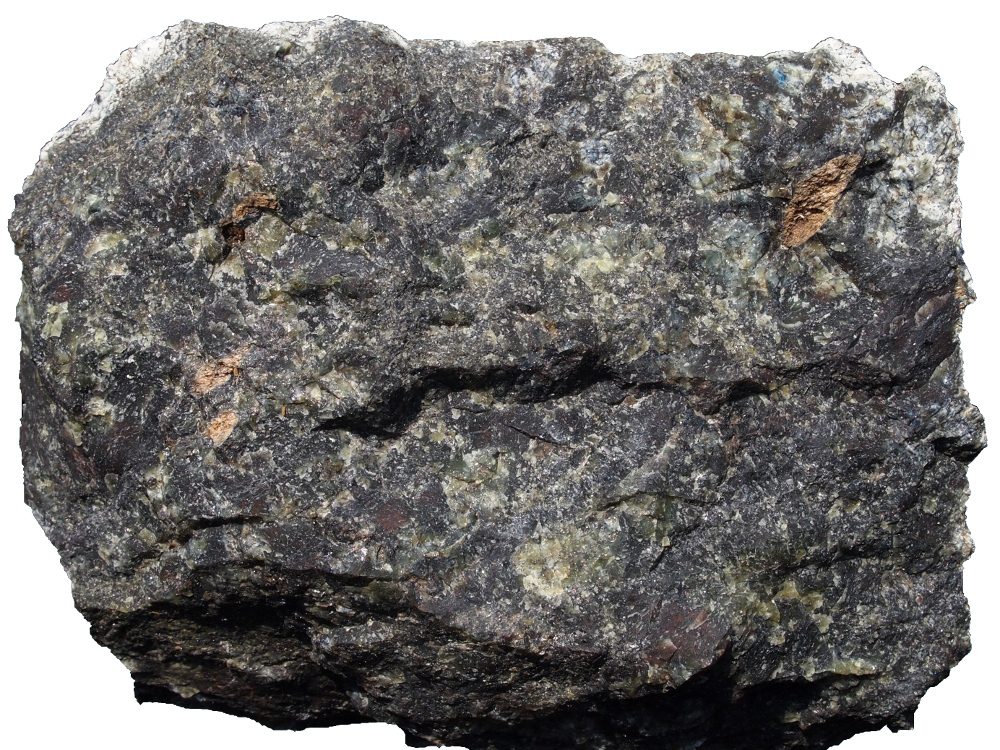 Vzorek pochází od Chrastic u Starého Města pod Sněžníkem. Skutečná šířka vzorku je 11,5 cm.